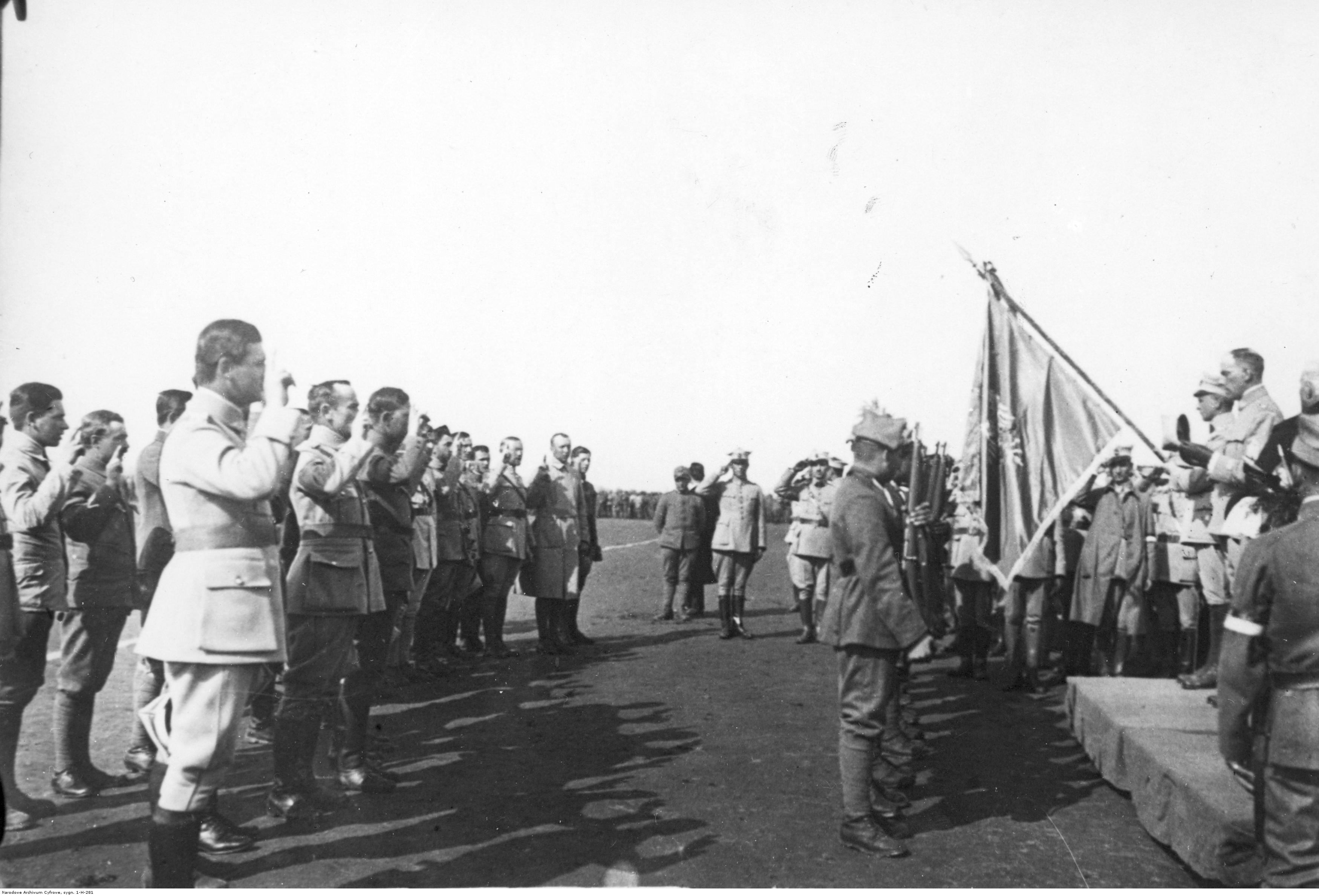 Polski obóz wojskowy w La Mandria di Chivasso pod Turynem - uroczystość zaprzysiężenia oficerów. Koncern Ilustrowany Kurier Codzienny - Archiwum Ilustracji. Sygnatura: 1-H-281